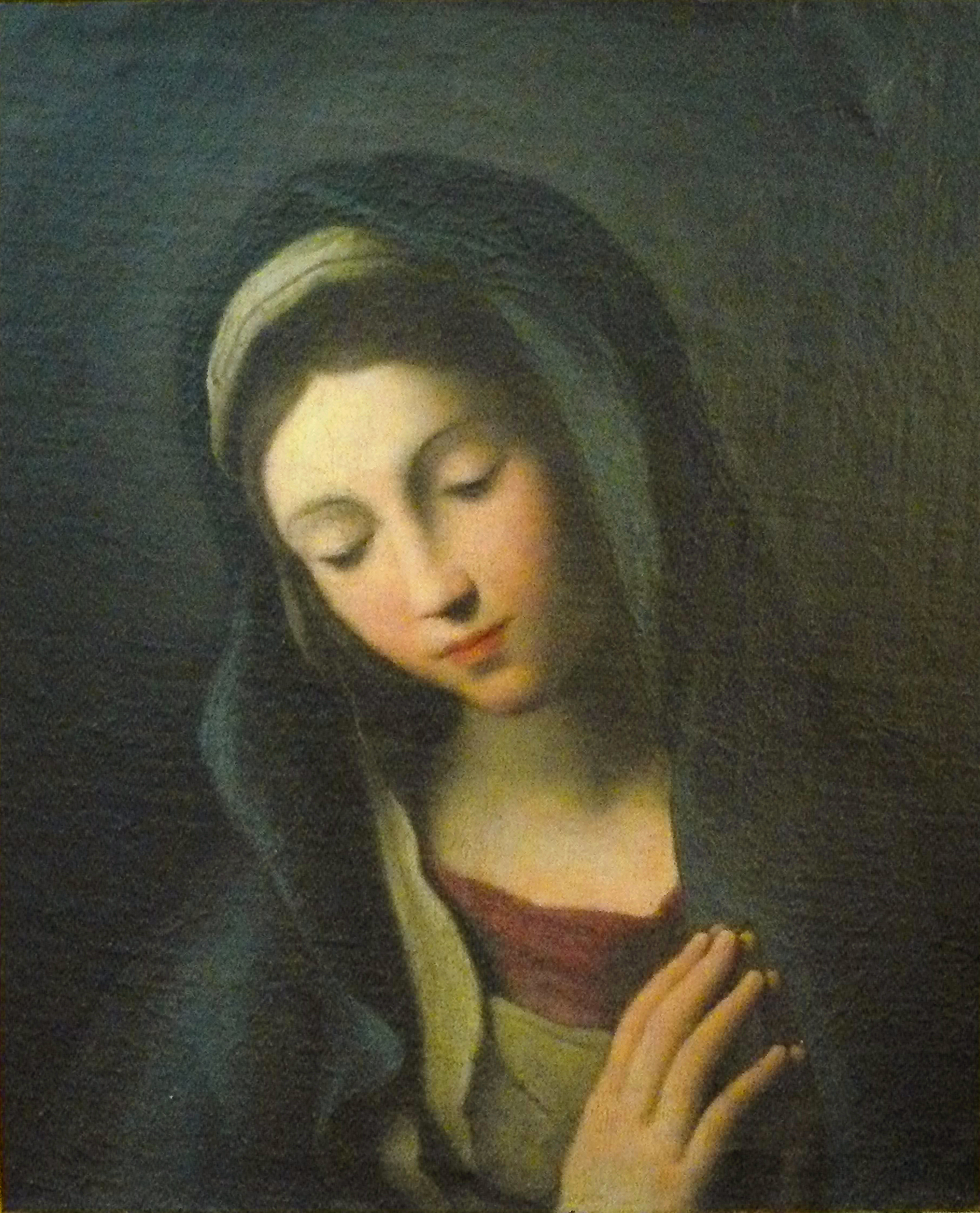 (Suiveur de / follower of) Il Sassoferrato - Oil - Vierge en prière - 60x49cm; cette oeuvre italienne date de la fin du 17ème siècle ou du début du 18ème siècle. En l'absence de plus d'éléments elle est considérée comme étant d'un suiveur ou d'un élève du Sassoferato plutôt que du maître lui-même.